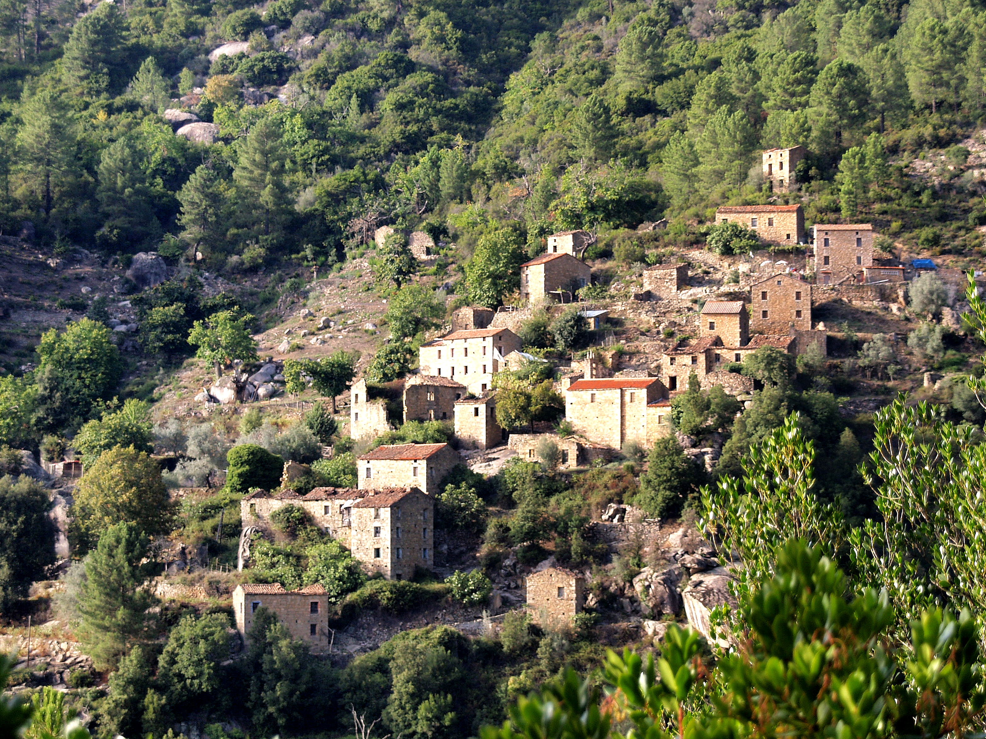 Murzo, Ouest Corse (Corse) - Muna, village abandonné